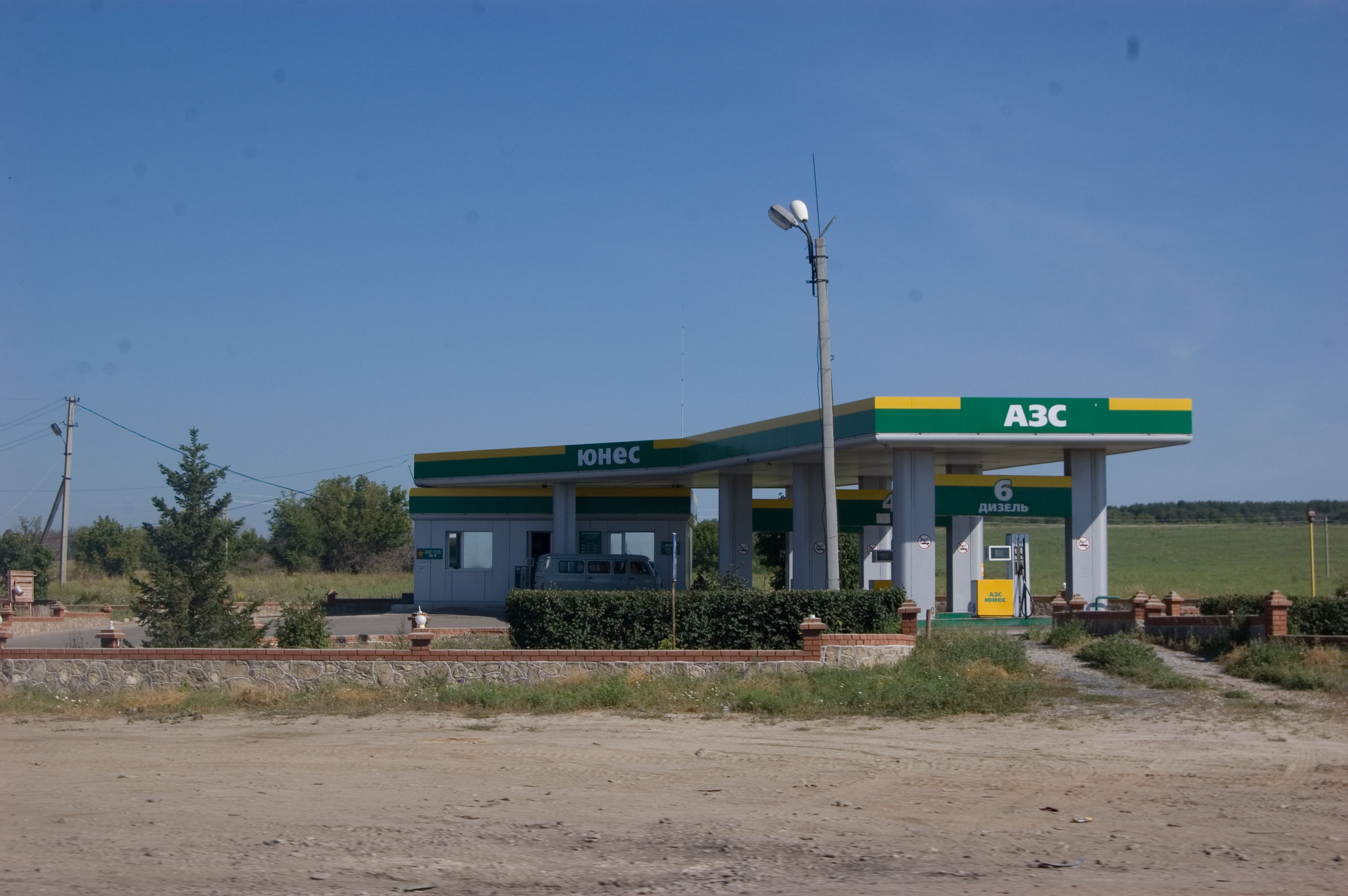 "ЮКОС", пос Новоспассое, Ульяновская обл